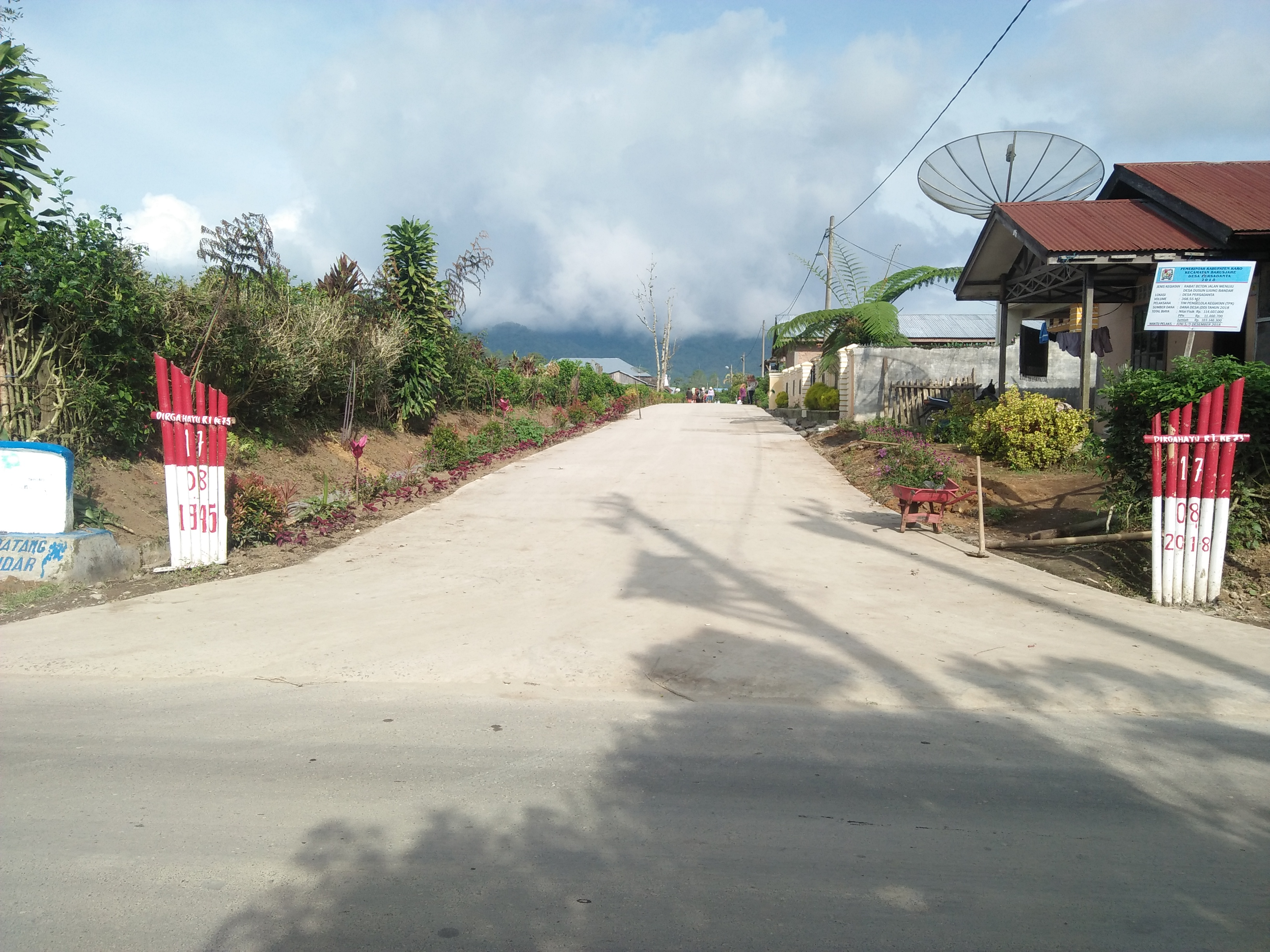 Desa Persadanta